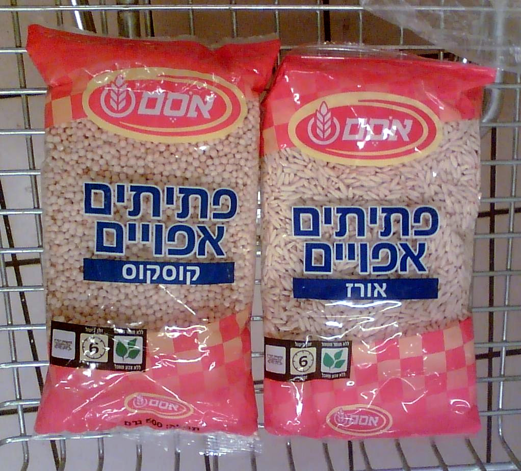 he:פתיתים באריזתם